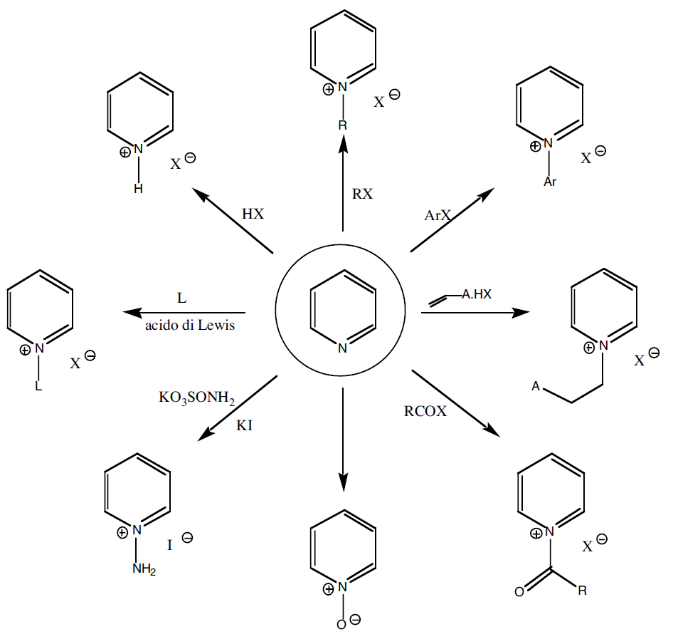 Schema delle reazioni dalla piridina